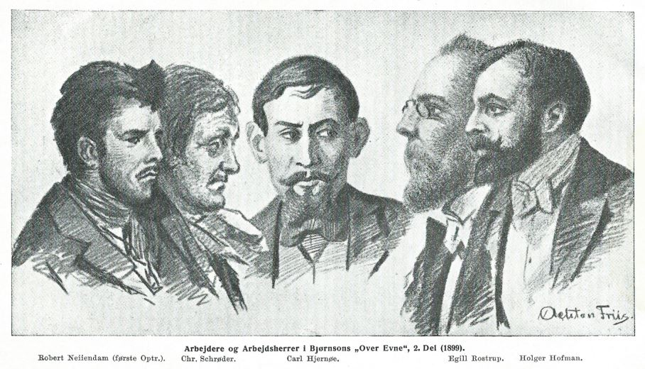 Tegning af Achton Friis (1871-1939): Medvirkende i Folketeatrets opsætning (1899) af Bjørnstjerne Bjørnsons "Over ævne. Andet stykke" (1895). Fra venstre mod højre: Robert Neiiendam (1880-1966), Christian Schrøder (1869-1980), Carl Hjernøe (1871-1913), Egill Rostrup (1876-1940) og Holger Hofman (1868-1929).